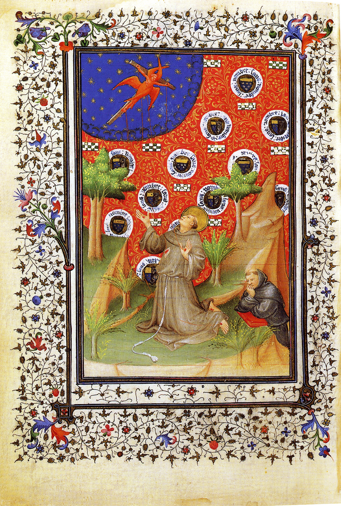 Heures de Maréchal de Boucicau. S.Francis